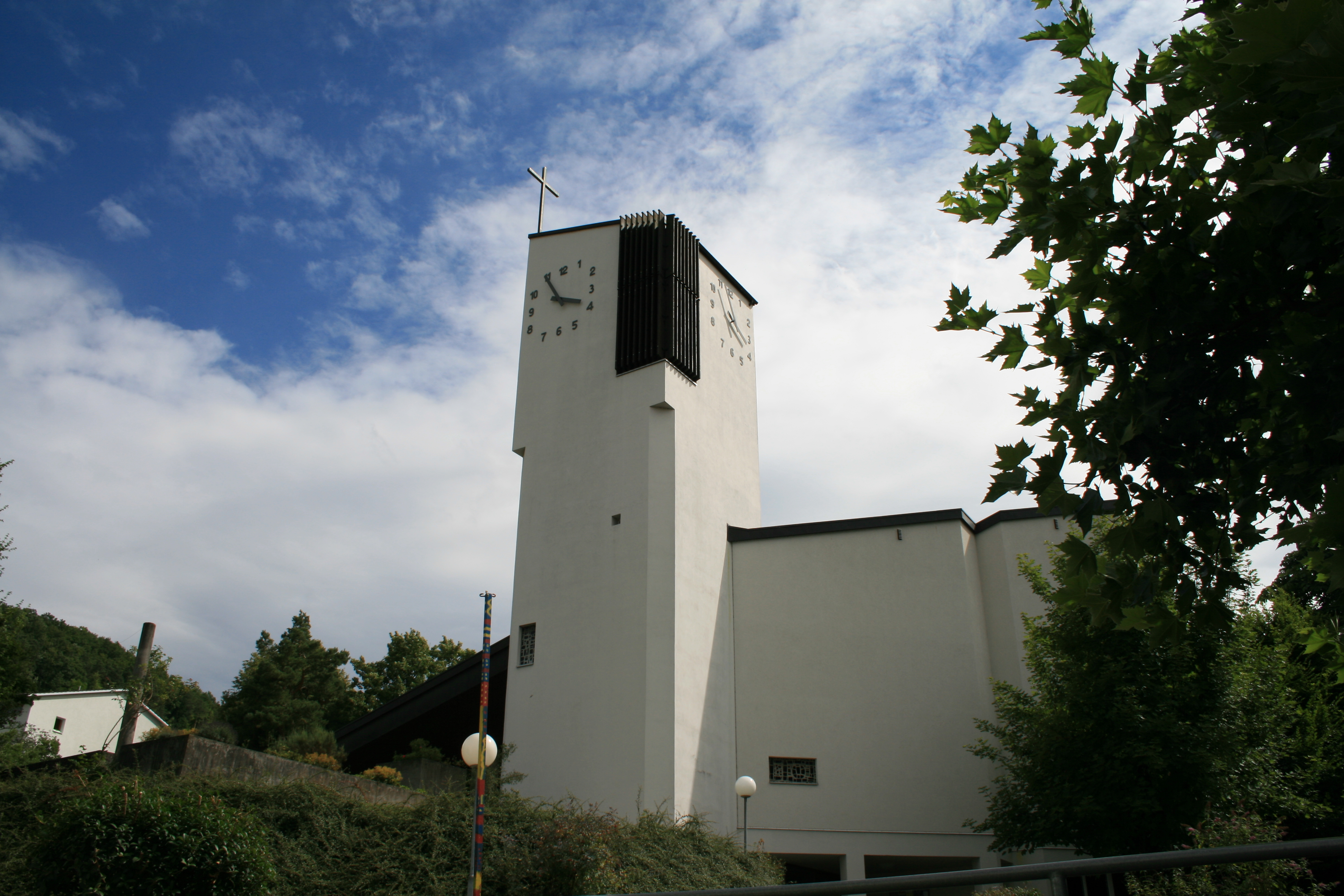 Kirche in Zeihen AG, Schweiz